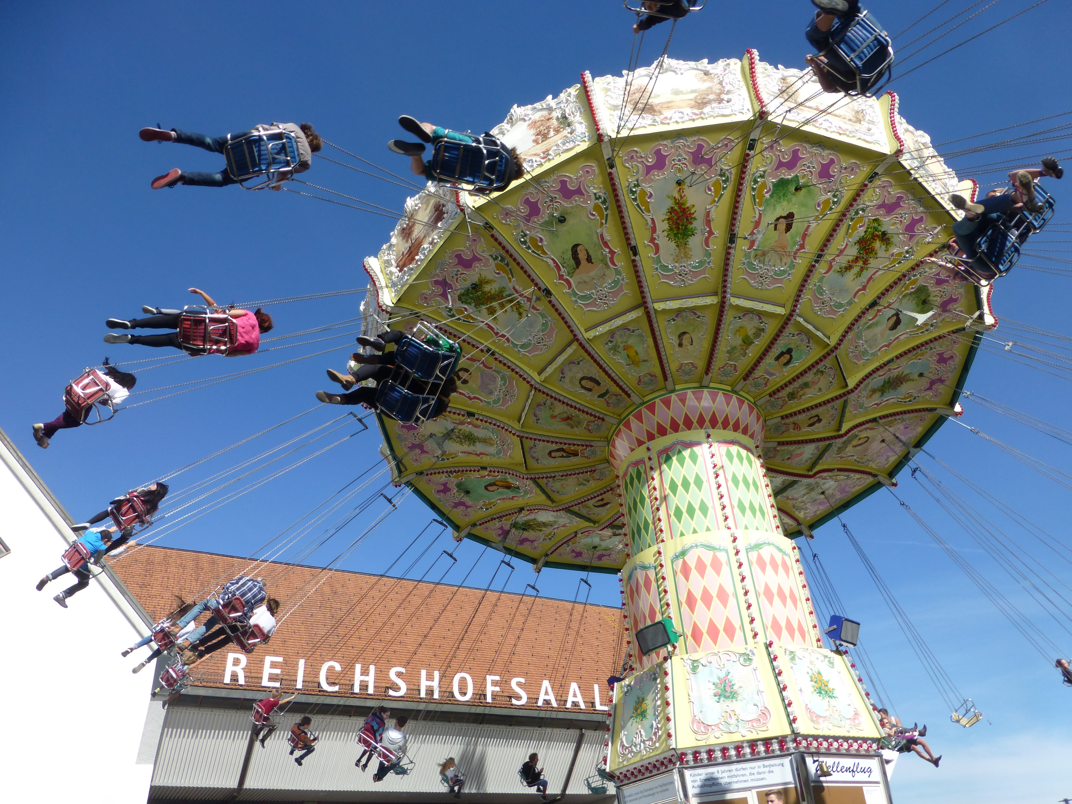 Die Lustenauer Kilbi, das größte Volksfest Vorarlbergs, im Jahr 2014